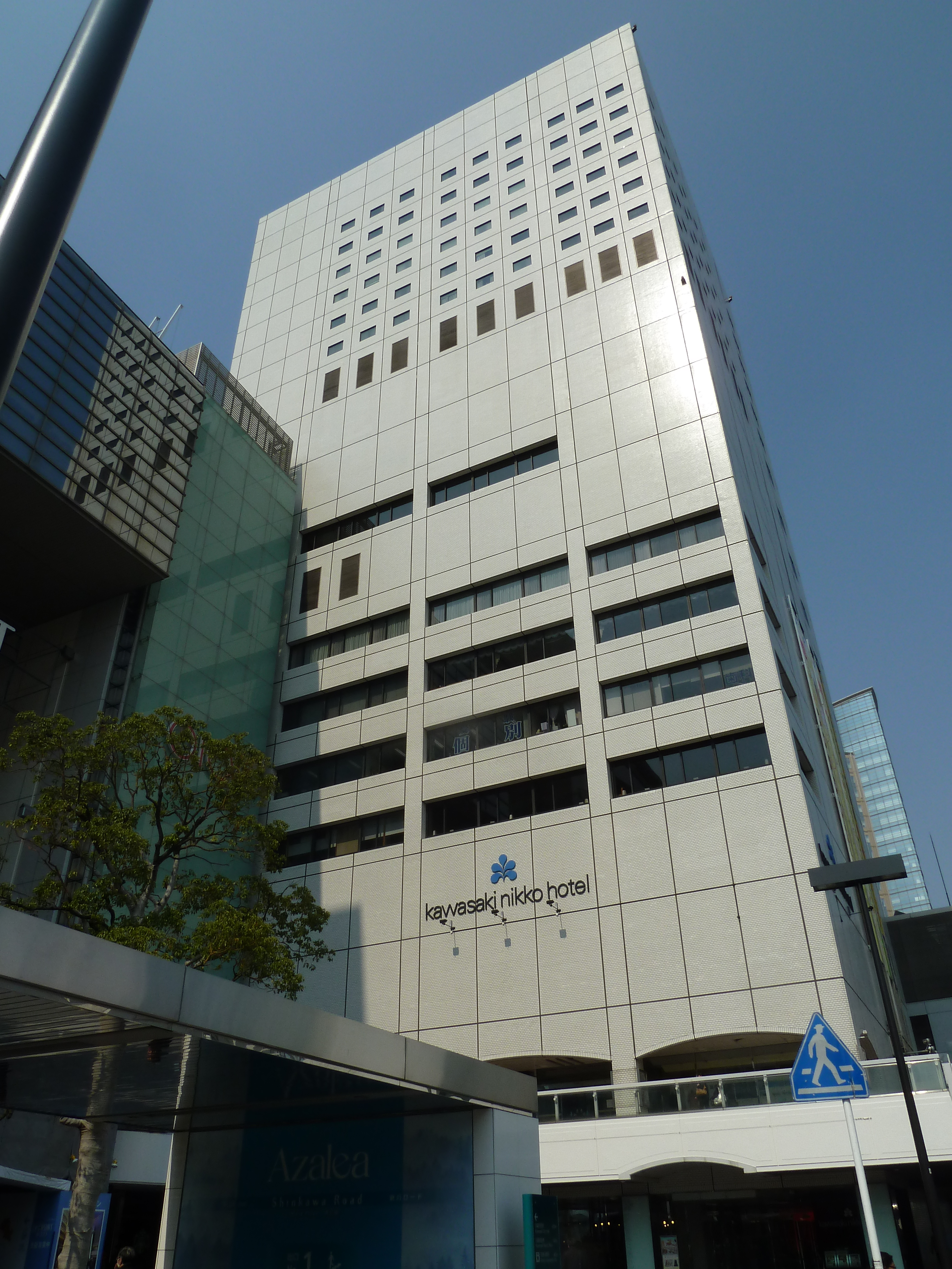 ニッコーホテル川崎